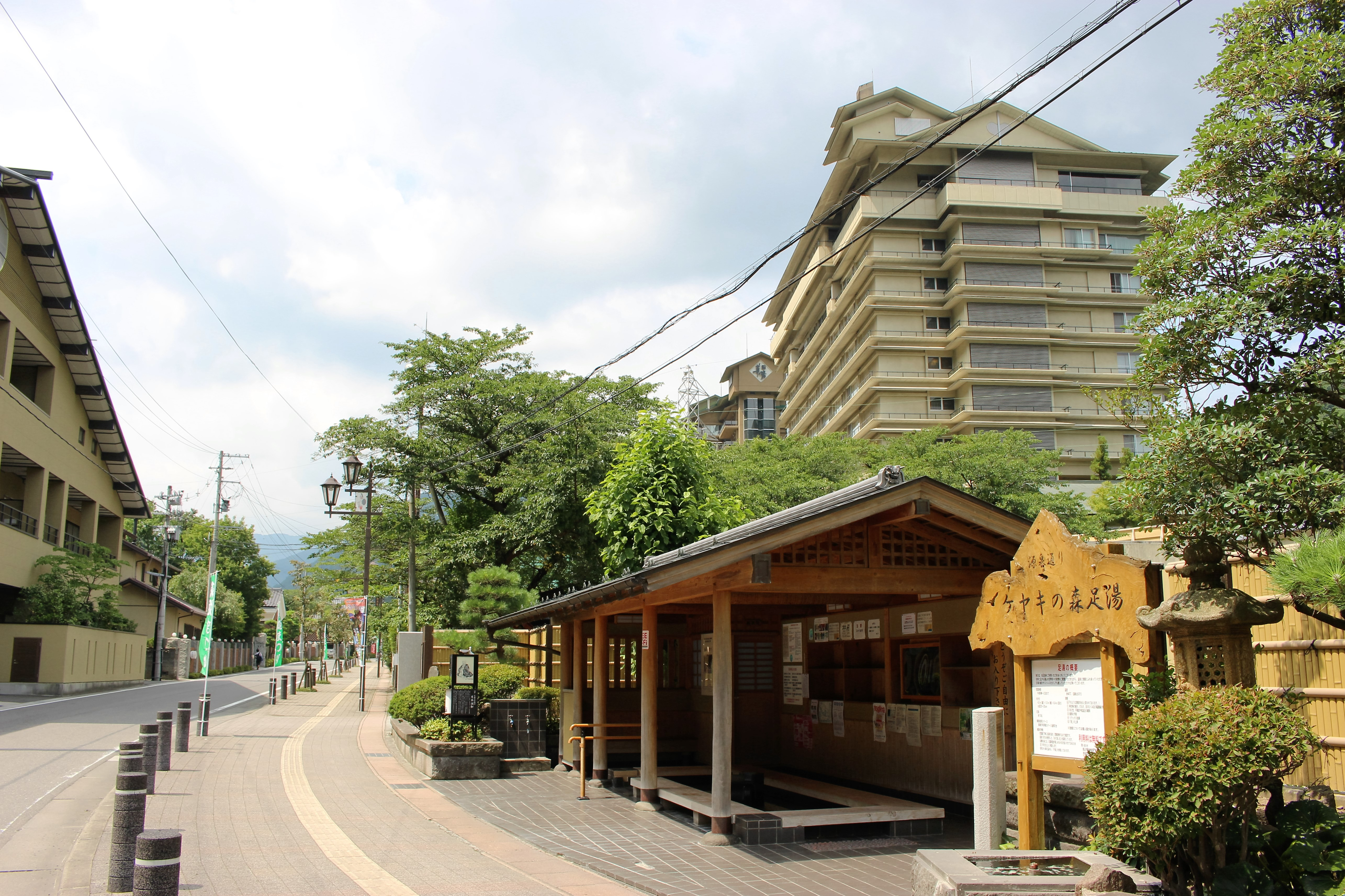 磐梯熱海温泉・源泉通り